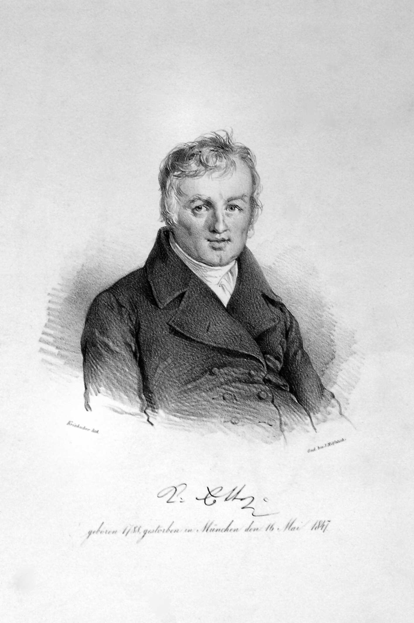 Caspar Ett, Lithographie von Josef Kriehuber